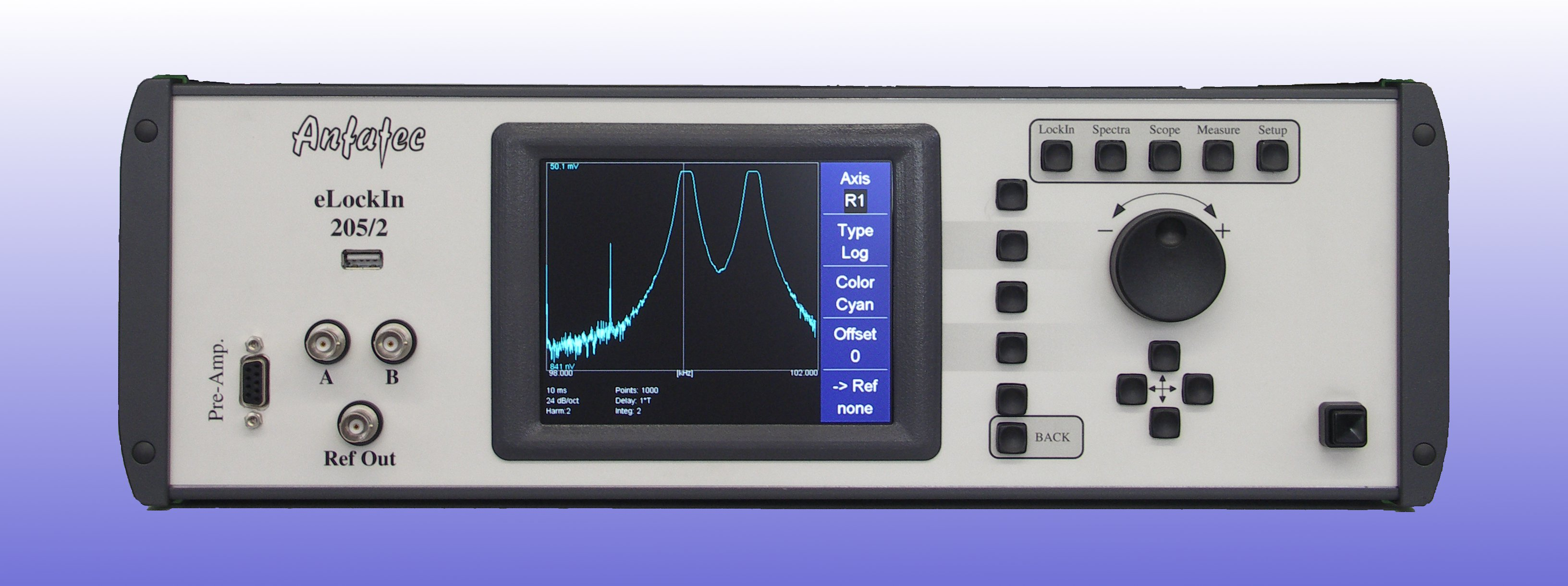 20 MHz digital lockin amplifier